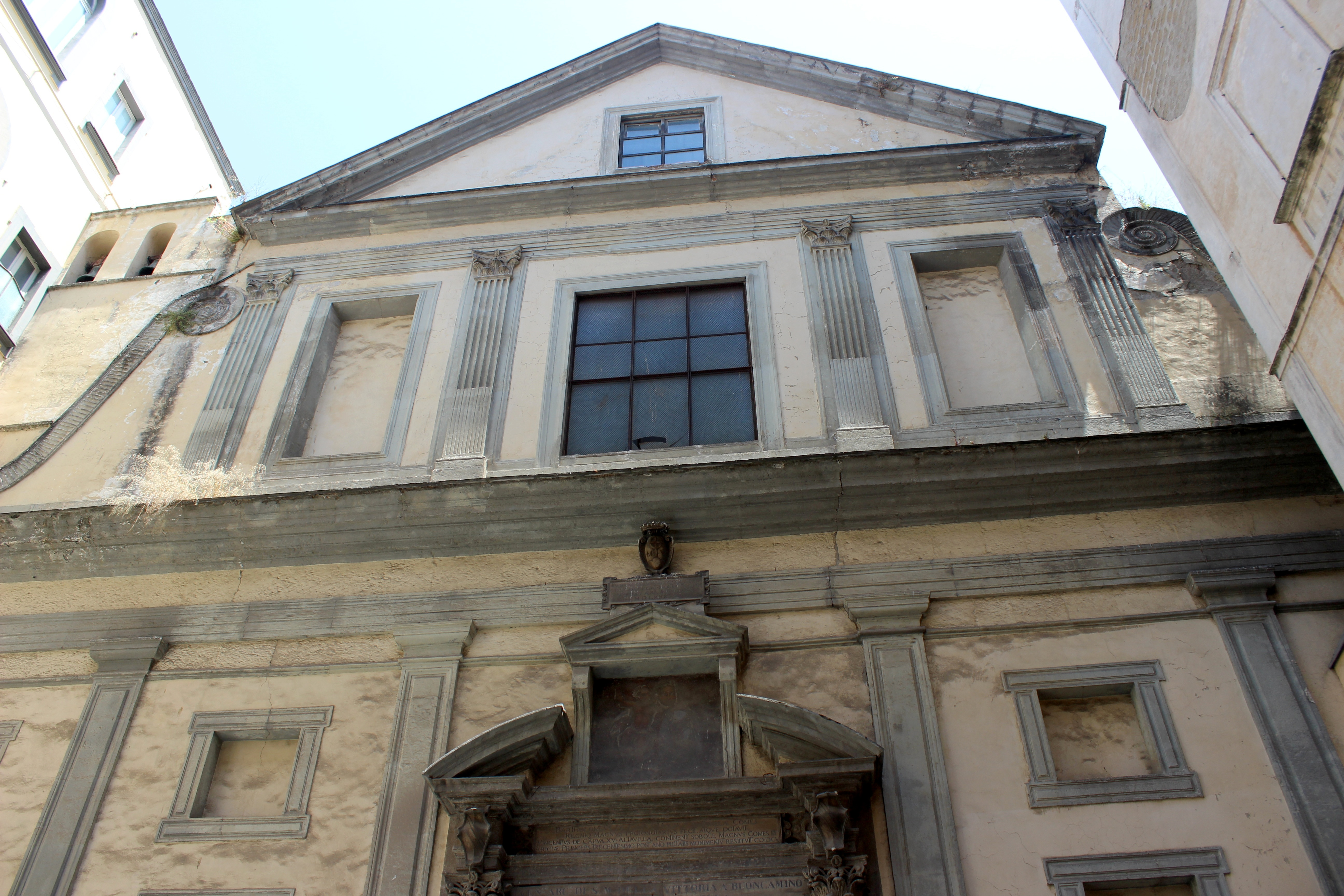 Nápoles, chiesa di Monteverginella. Fachada.